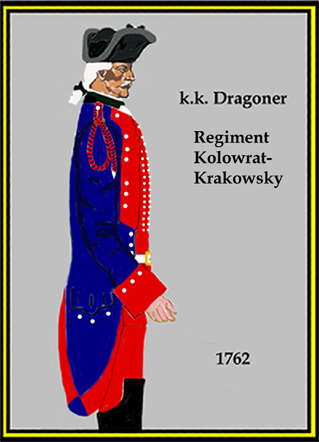 Österreichishes Dragoner-Regiment „Kolowrat-Krakowsy“ 1762 (Aus: L.& F. Funcken - „L'Uniforme et les Armes des soldats de la guerre en dentelle II“) Castermann (Tournai 1976)